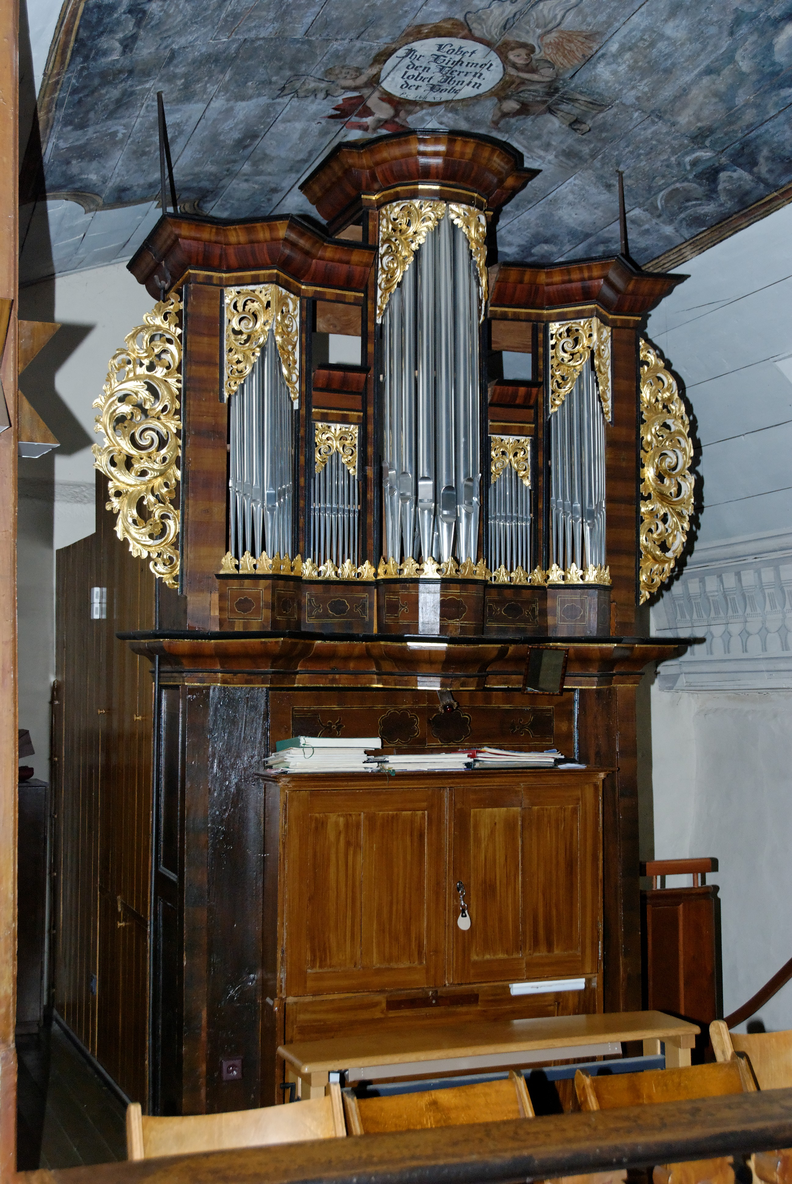 Die Orgel in der evangelischen Kirche Weiterode. Erbaut 1739 von Johan Weyer.